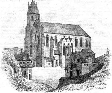 Katedra gnieźnieńska. Litografia z pisma "Przyjaciel Ludu" z 1843 r.